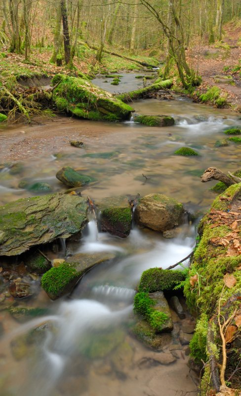 Hörschbach